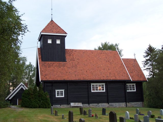 Siggerud kirke i Ski kommune, Akershus, Norway